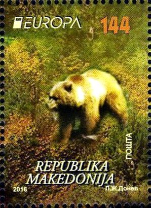 Ursus arctos